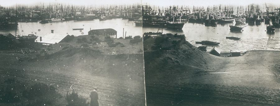 Photo ancienne de San Francisco en 1851. Retravail d'un fichier déjà présent dans Wikimedia (Panoramic San Francisco from Rincon Hill 1851)